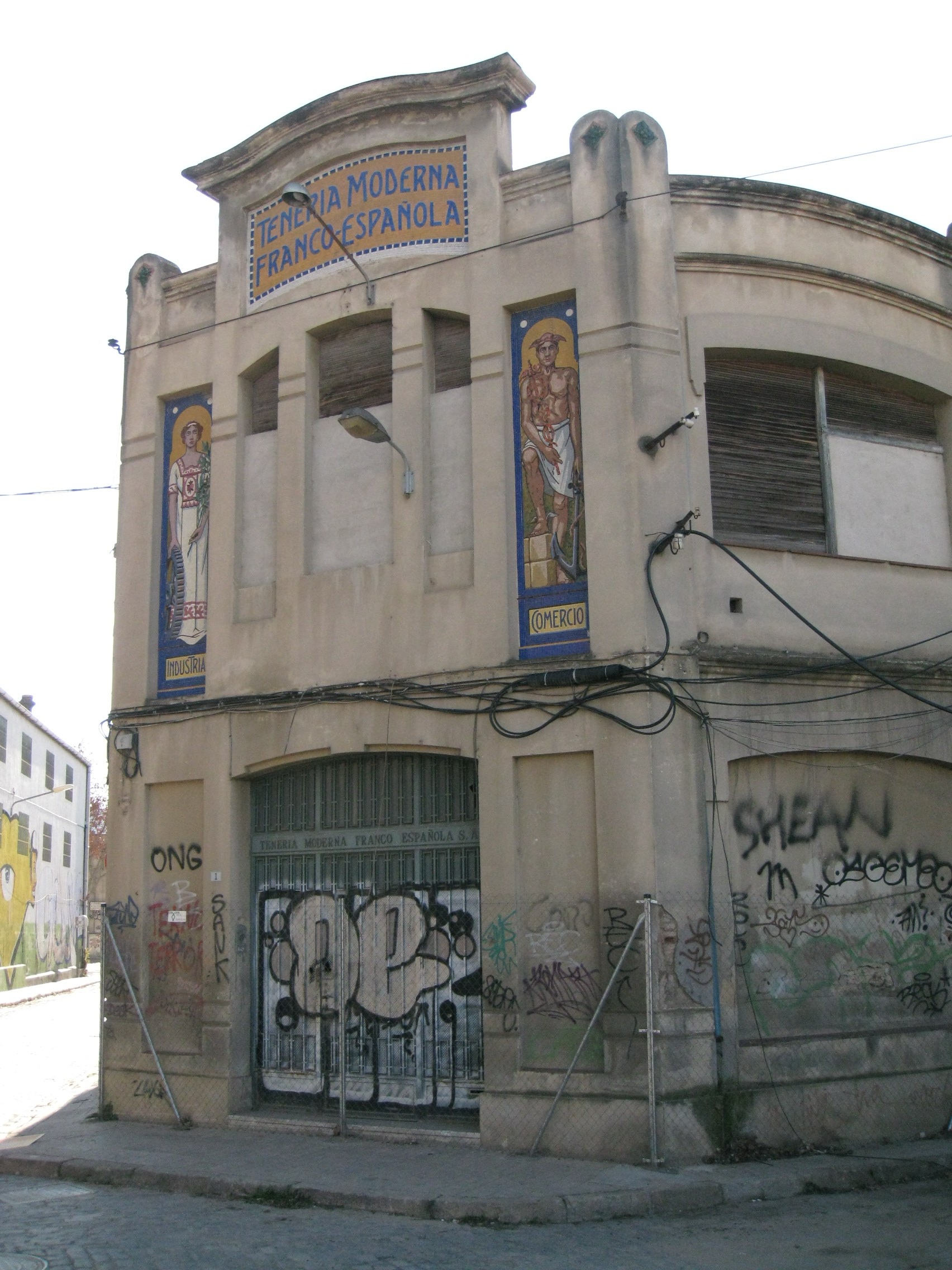 Teneria Moderna (Mollet del Vallès)